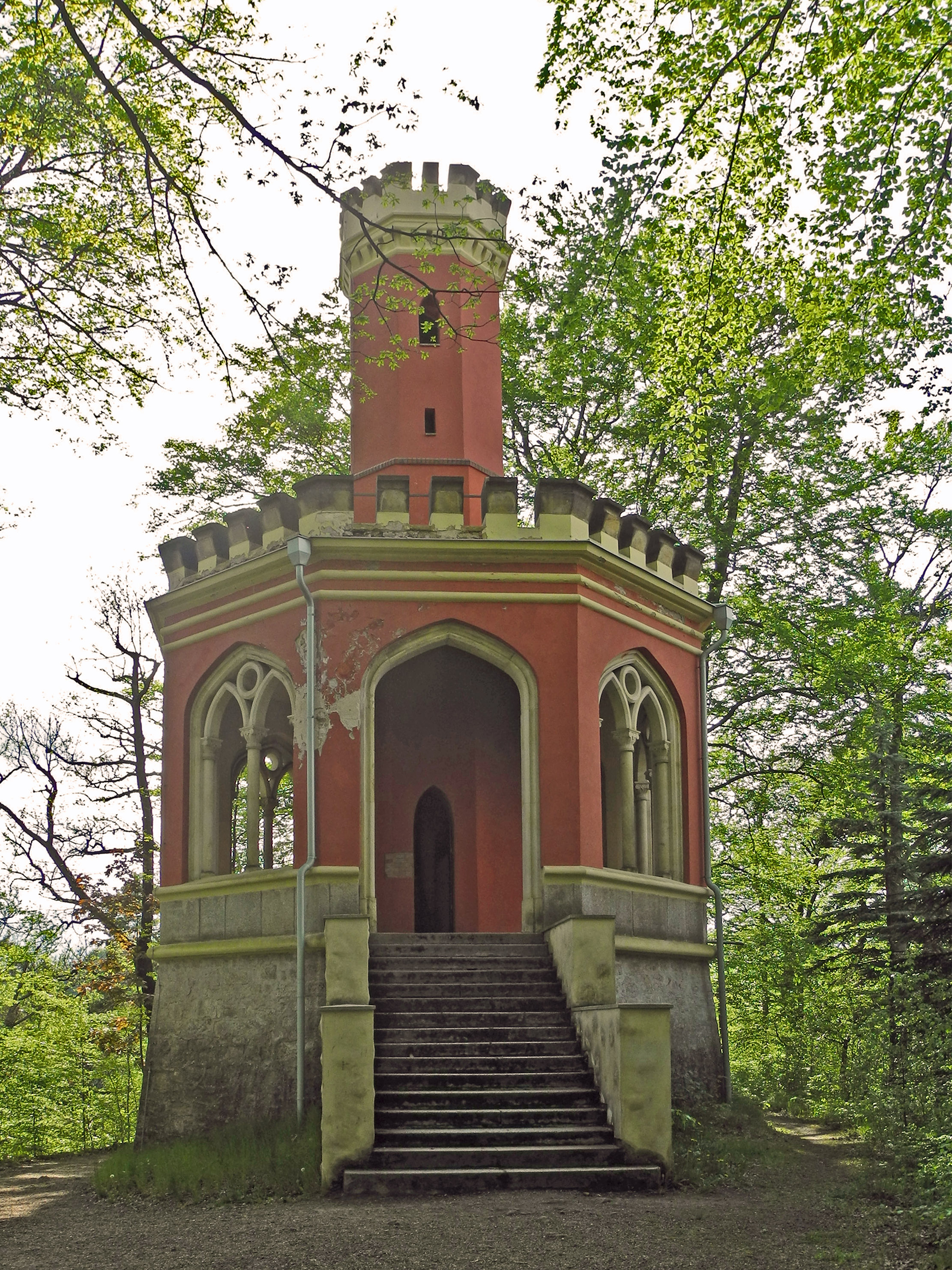 Aussichtsturm Karl IV bei Karlsbad (Karlovy Vary)